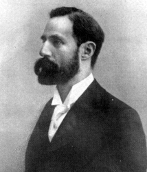 Carlo Lodovico Oberziner